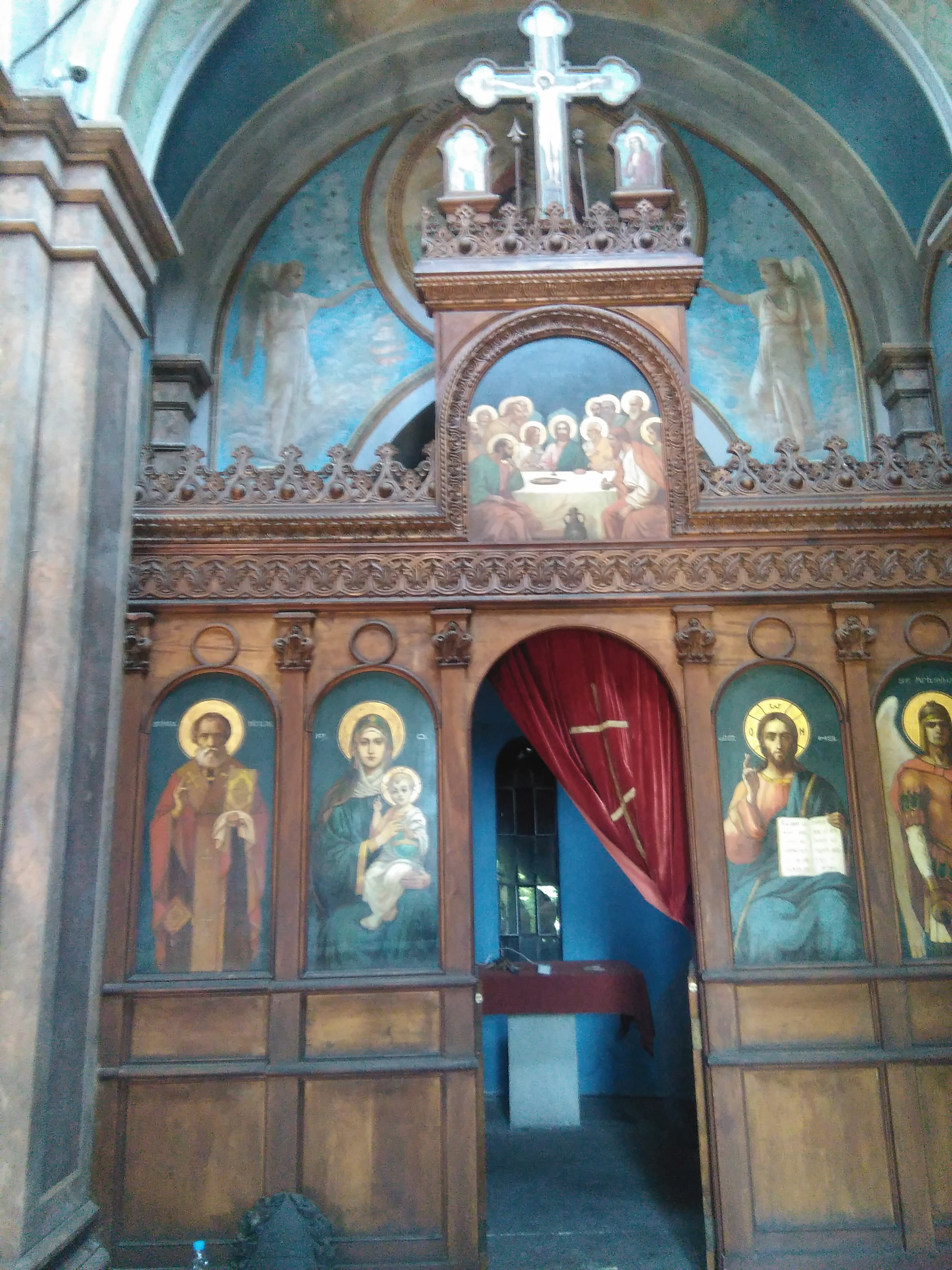 Румънски мавзолей костница при Гривица.